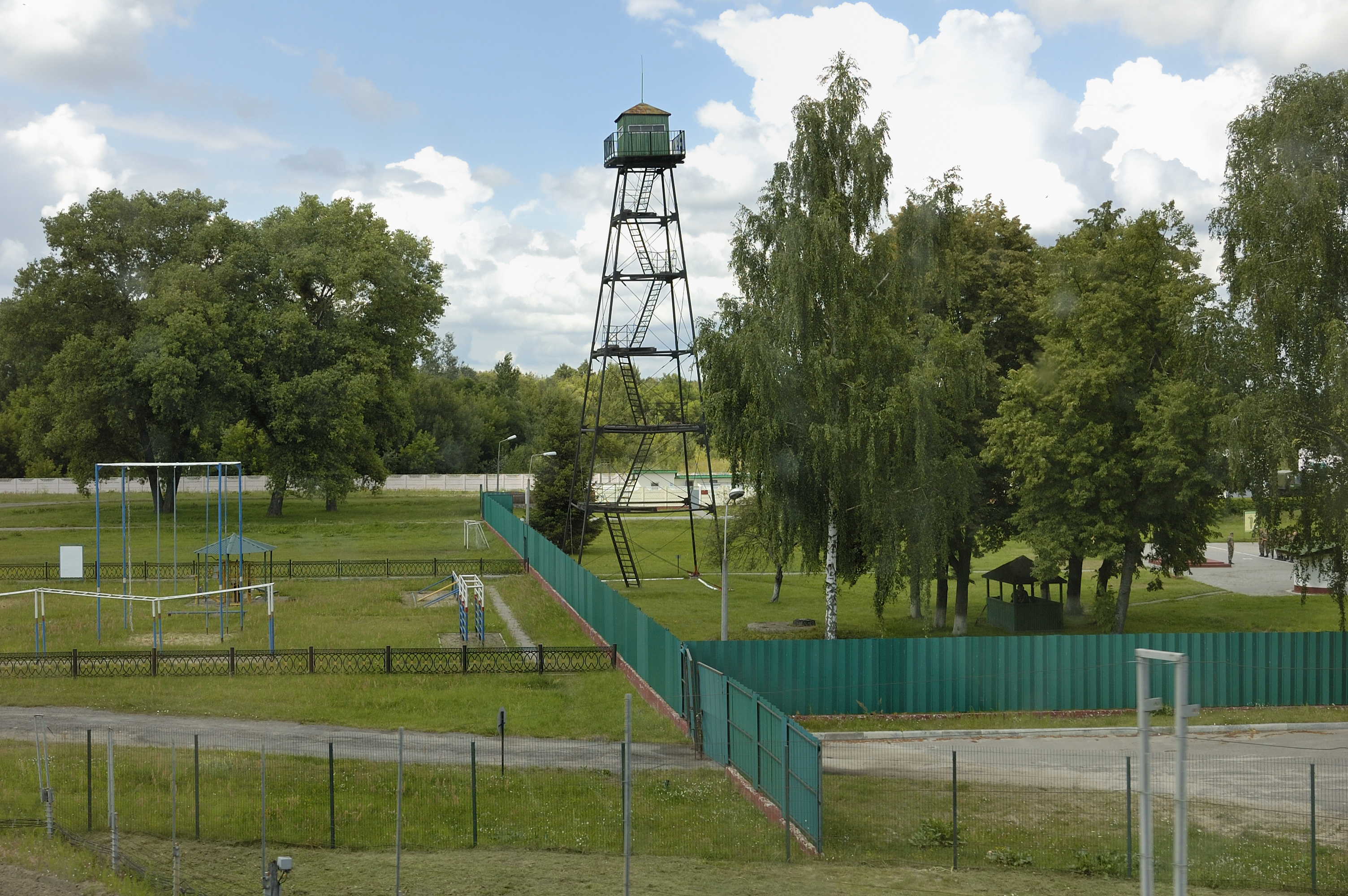 Пограничная застава "Брест" имени Кижеватова